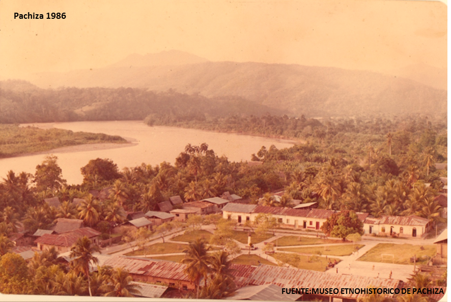 Pachiza antaño